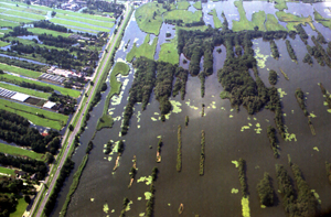 Nieuwkoopse Plassen (Nieuwkoop's Ponds), the Netherlands